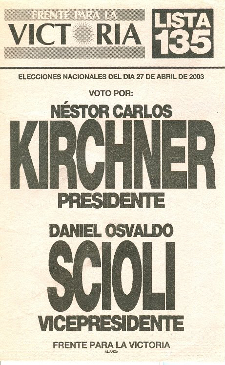 Boleta electoral de las Elecciones de Argentina de 2003 con la fórmula Kirchner-Scioli